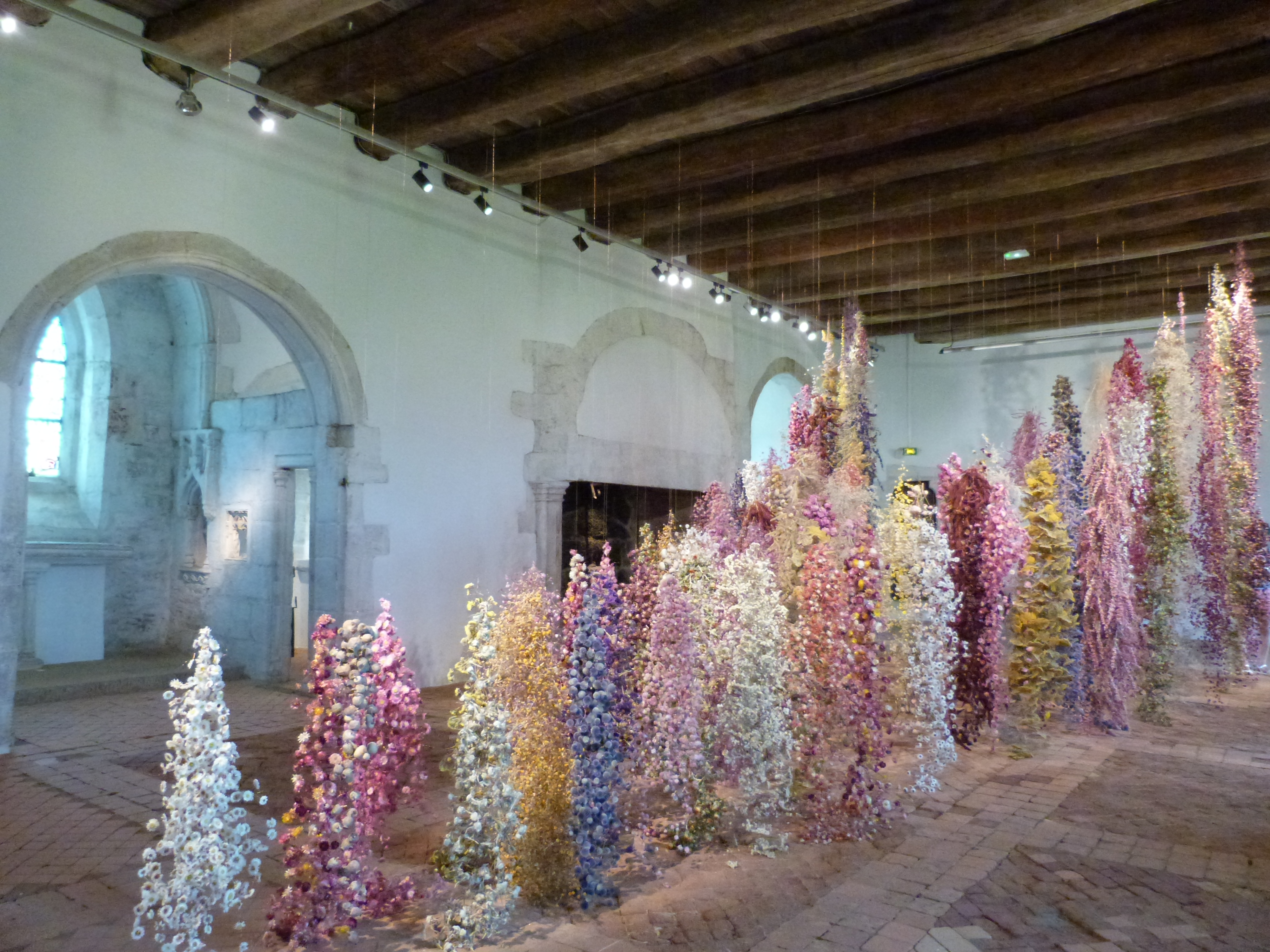 Exposition ARTE BOTANICA au château de la Roche-Jagu, C'est dans la salle seigneuriale du premier étage que l'artiste britannique Rebecca Louise Law a réalisé son oeuvre intitulée The banquet, oeuvre composée de 15 000 fleurs séchées.